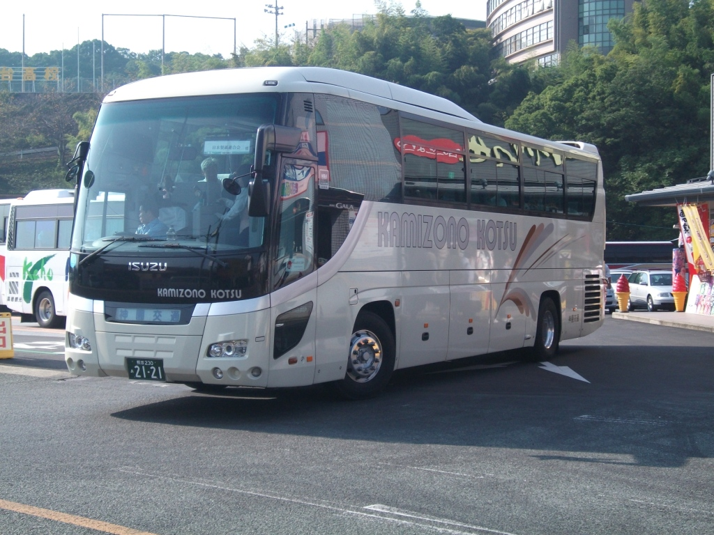 神園交通が保有するいすゞ・ガーラ